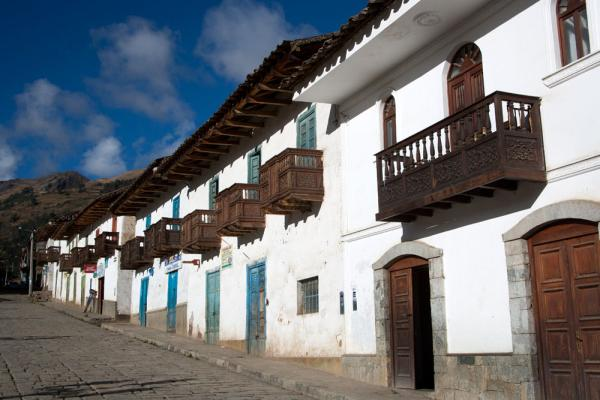 Balcones del perímetro oeste de Chacas